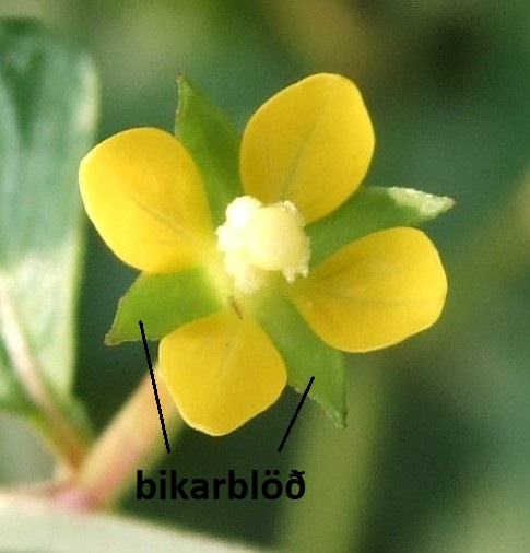 Bikarblöð